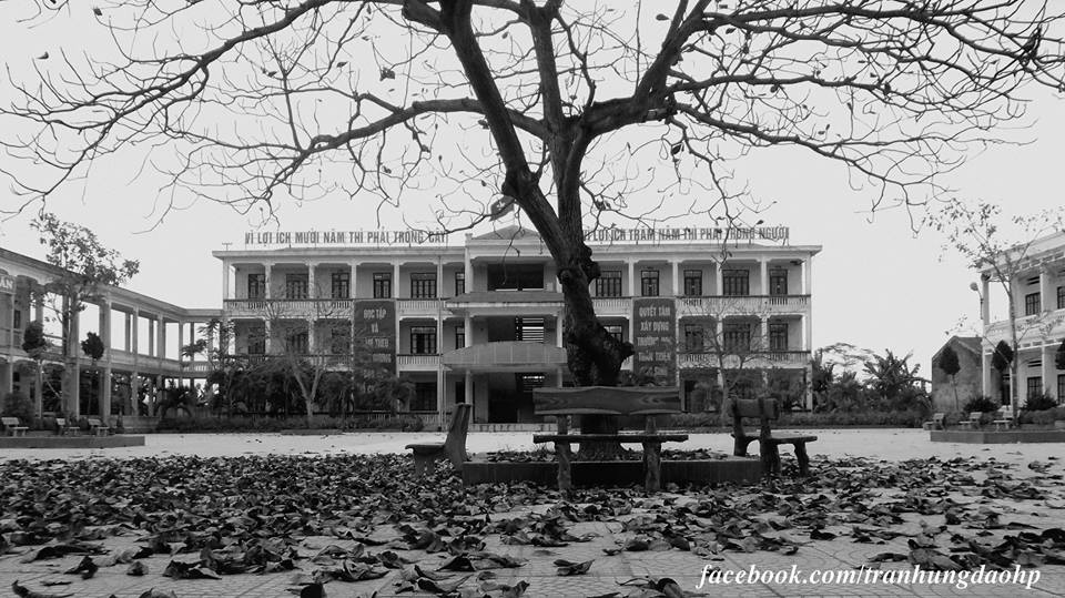 Sân trường THPT Trần Hưng Đạo, Hải Phòng vào cuối Đông